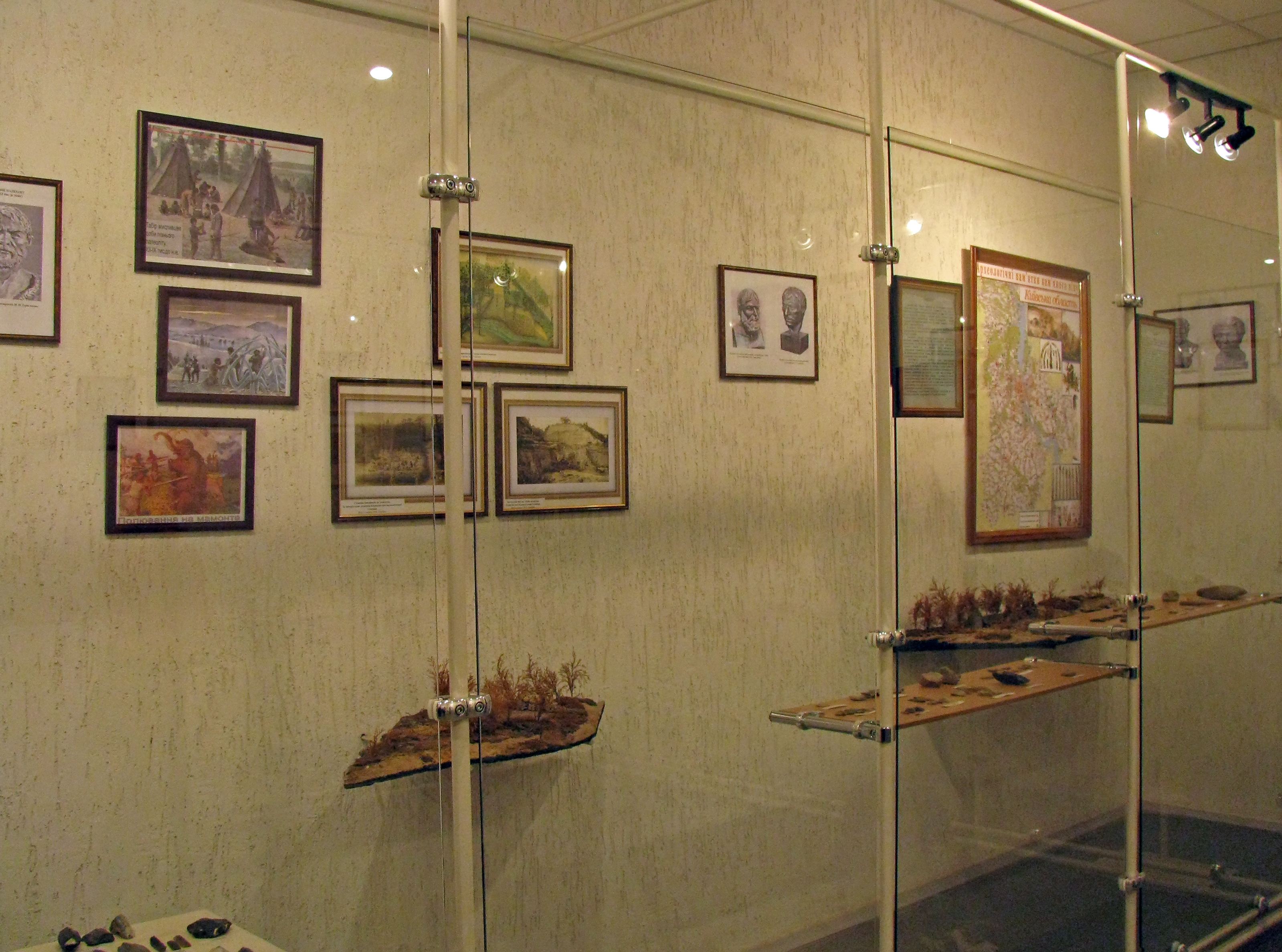 Київський обласний археологічний музей-зали музею